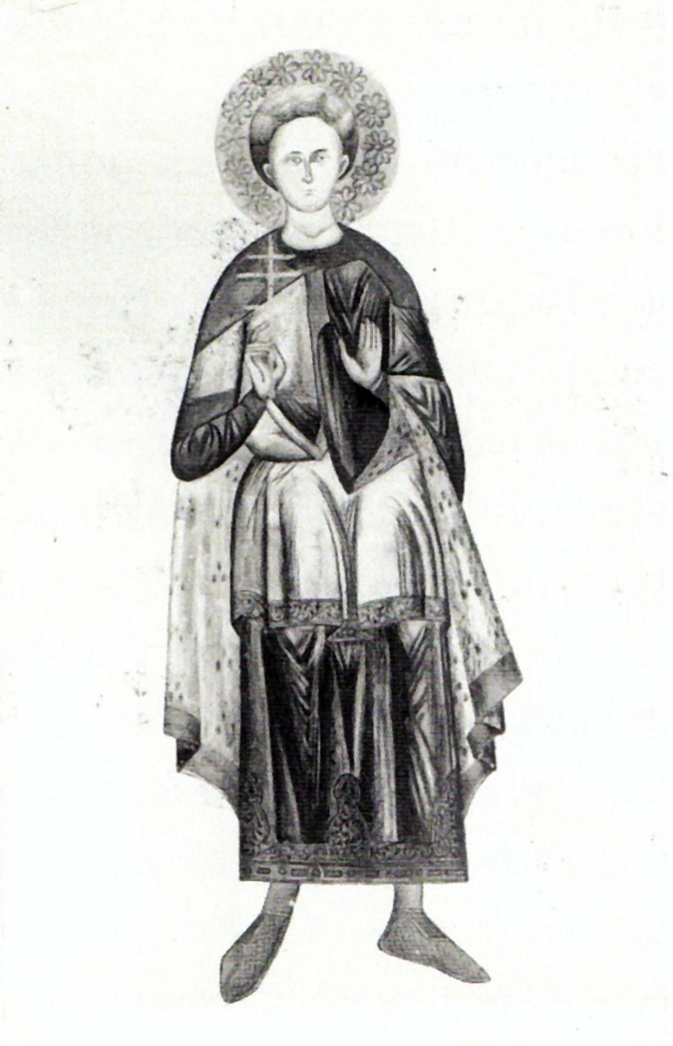 Sfântul Dumitru